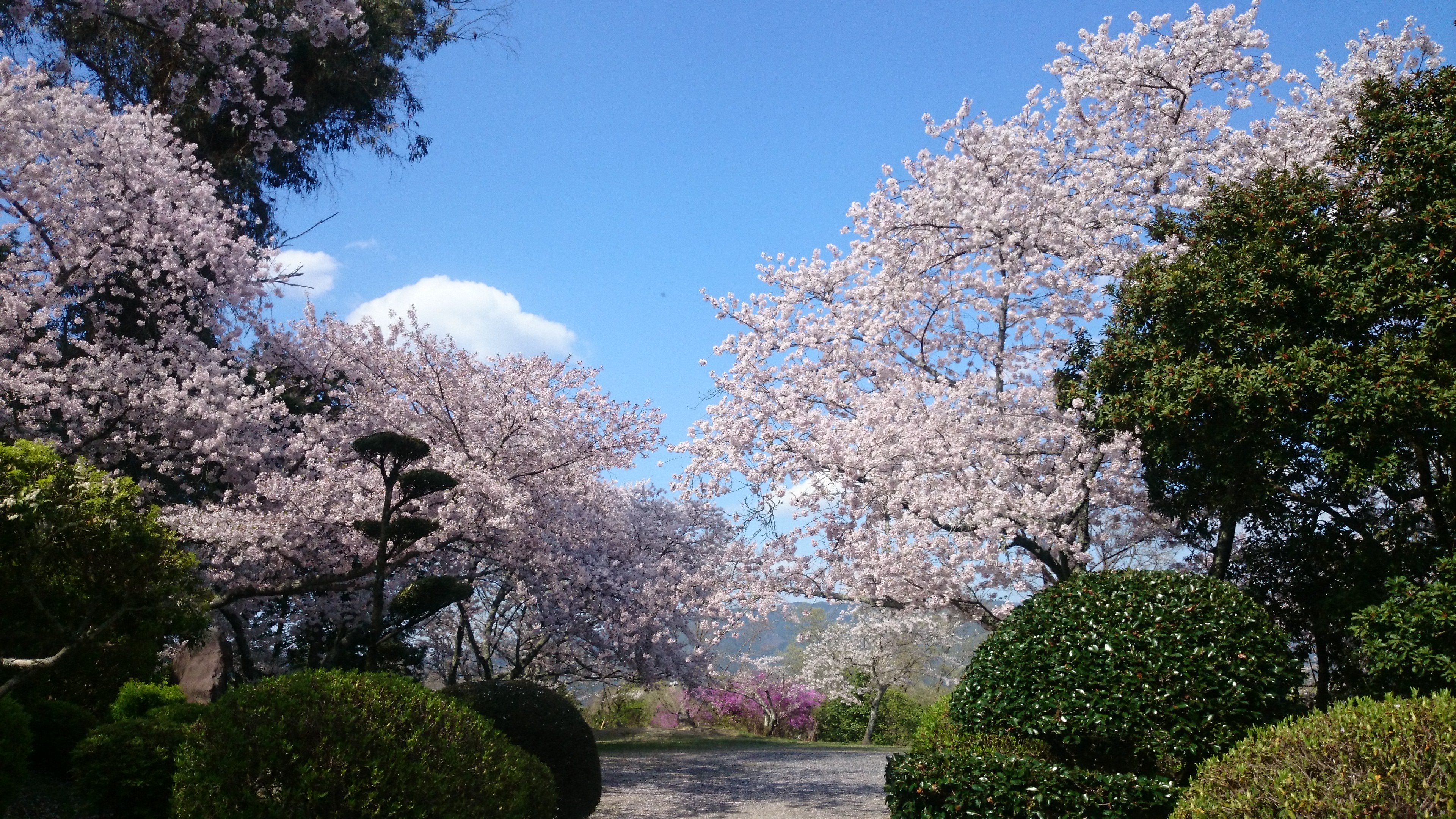 橋本市杉村公園の桜